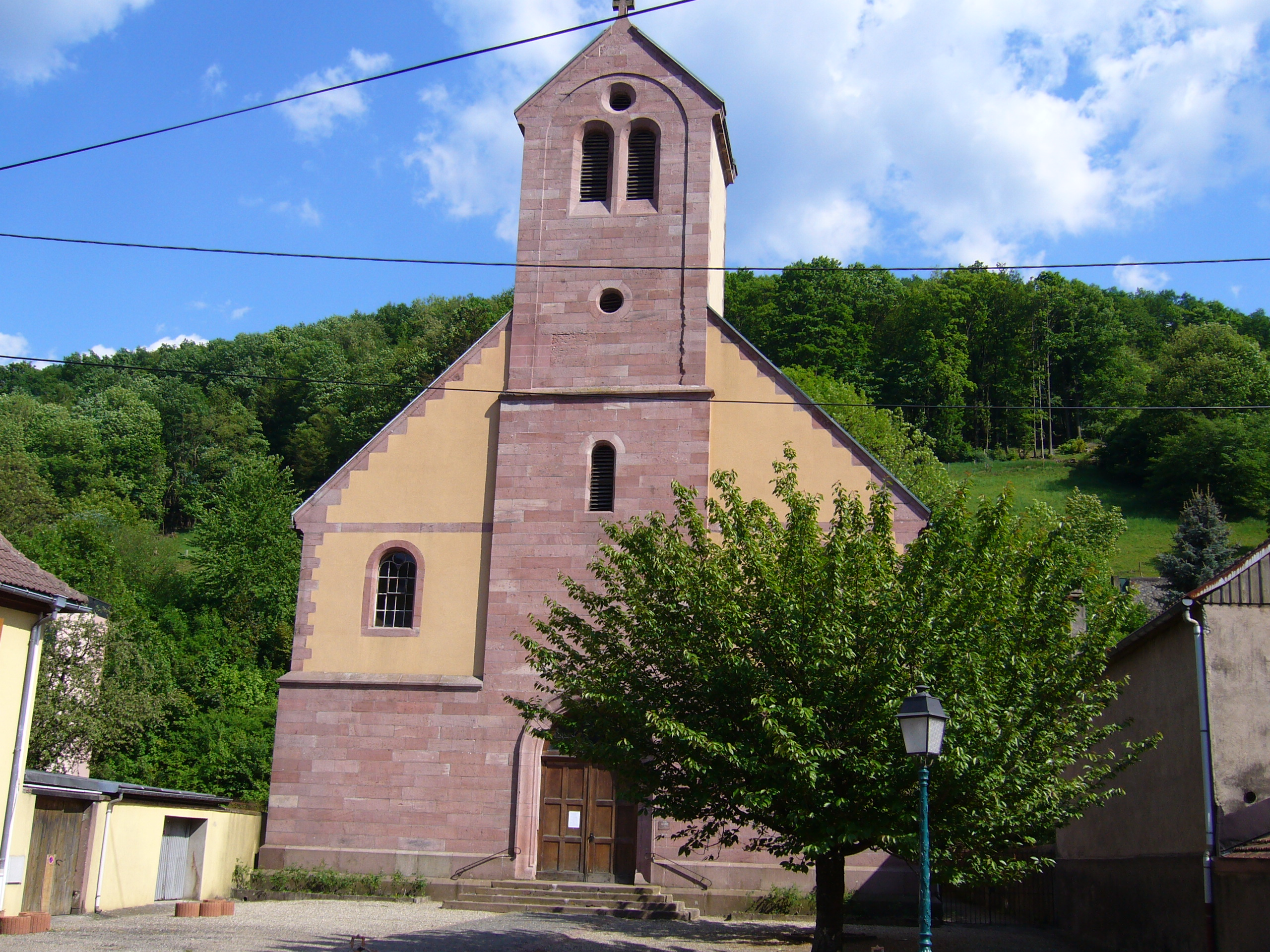 Sainte Marie-aux-Mines: Eglise luthérienne des chaînes